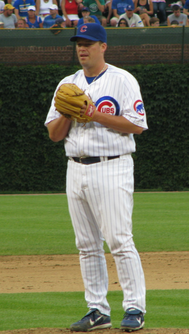 Jon Lieber